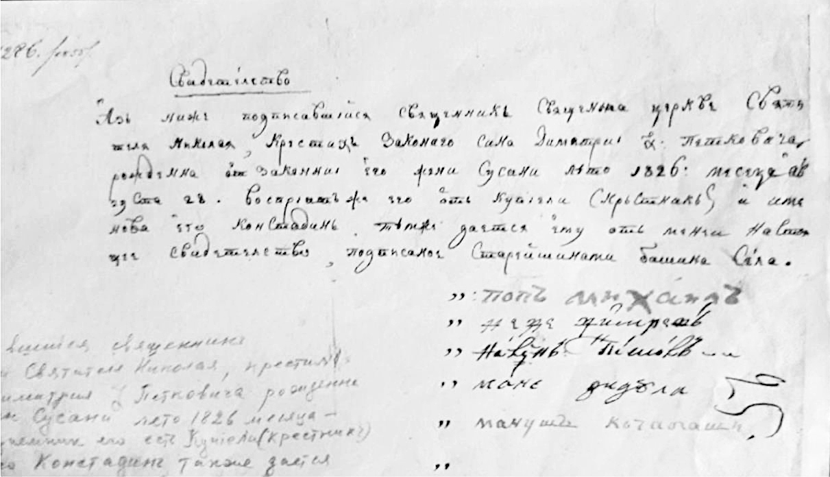 Кръщелно свидетелство на Константин Петкович.